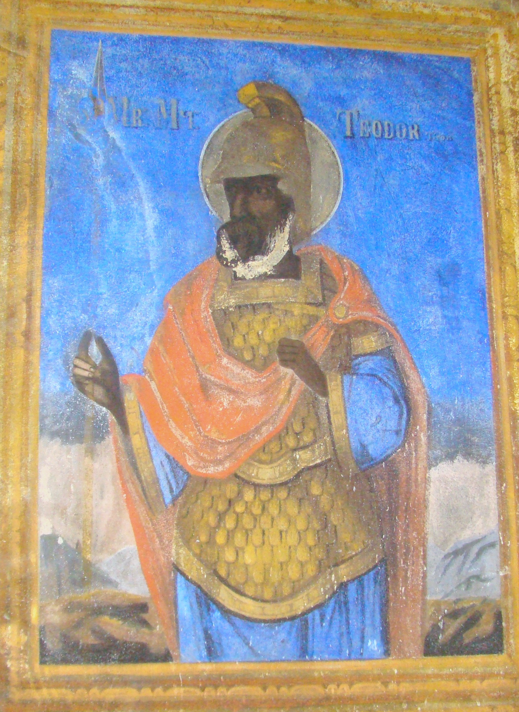 Biserica de lemn „Sfinții Voievozi” din Titerlești, județul Mehedinți